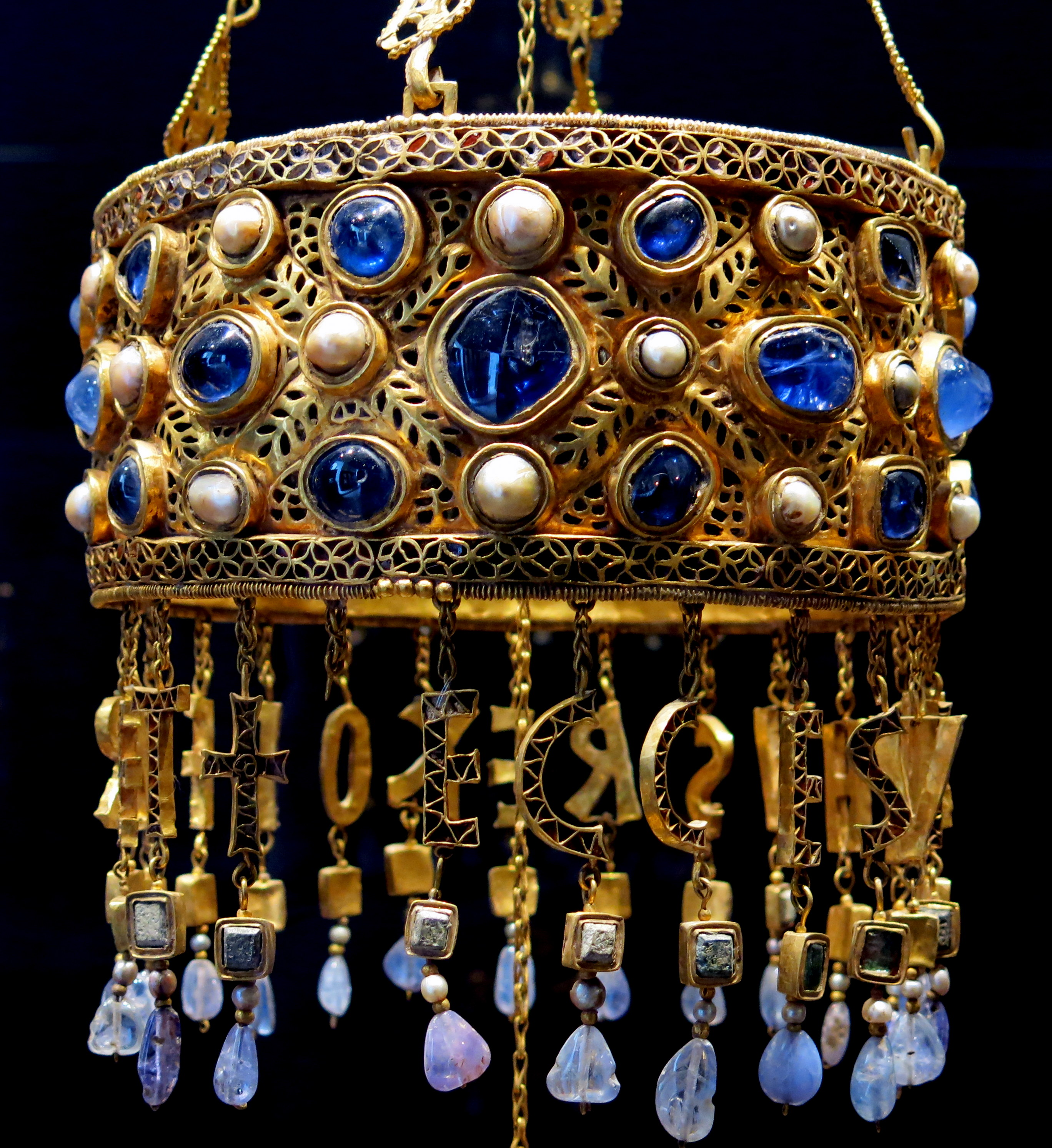 Corona de Recesvinto.